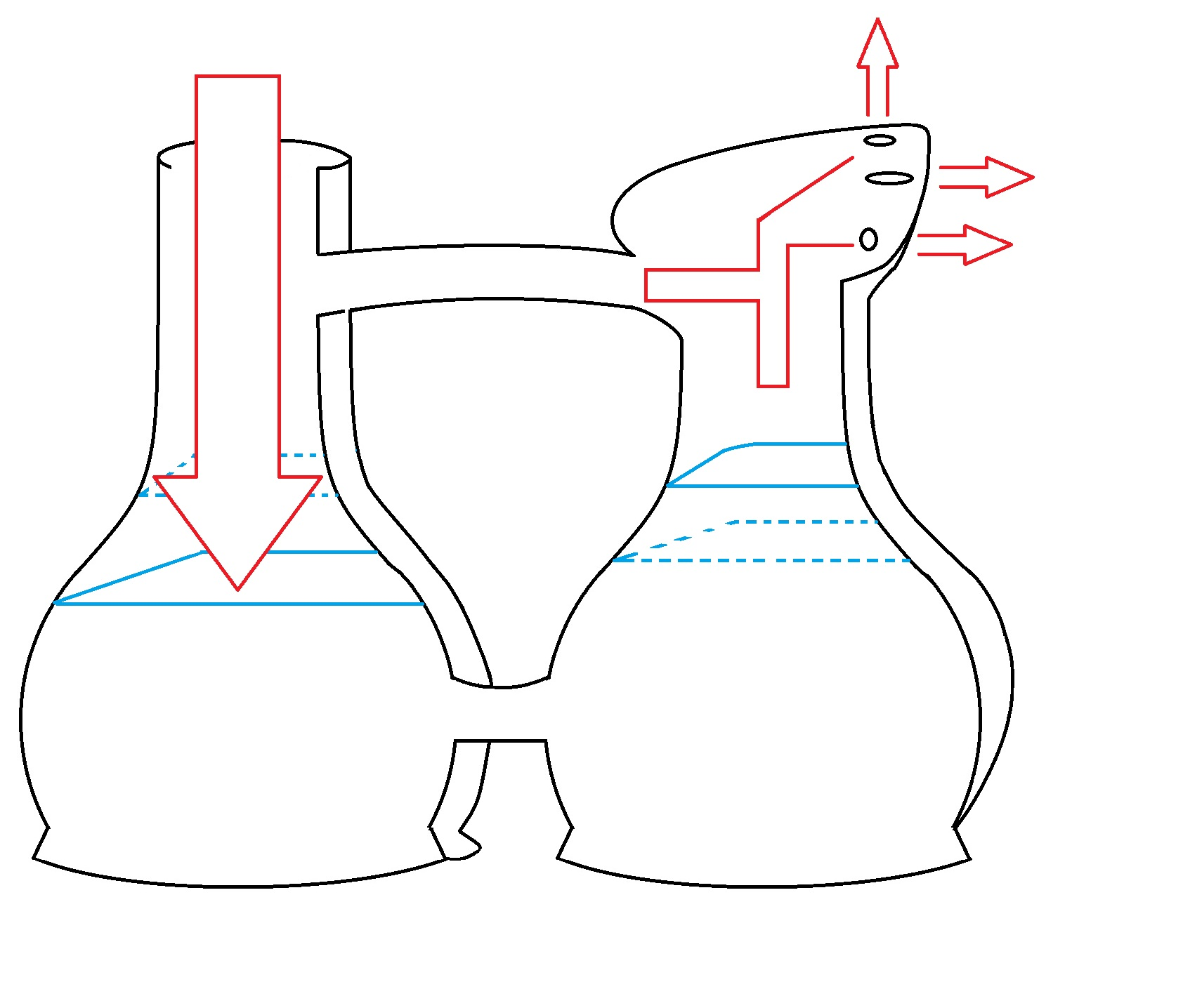 Gráfico de un huaco silbador